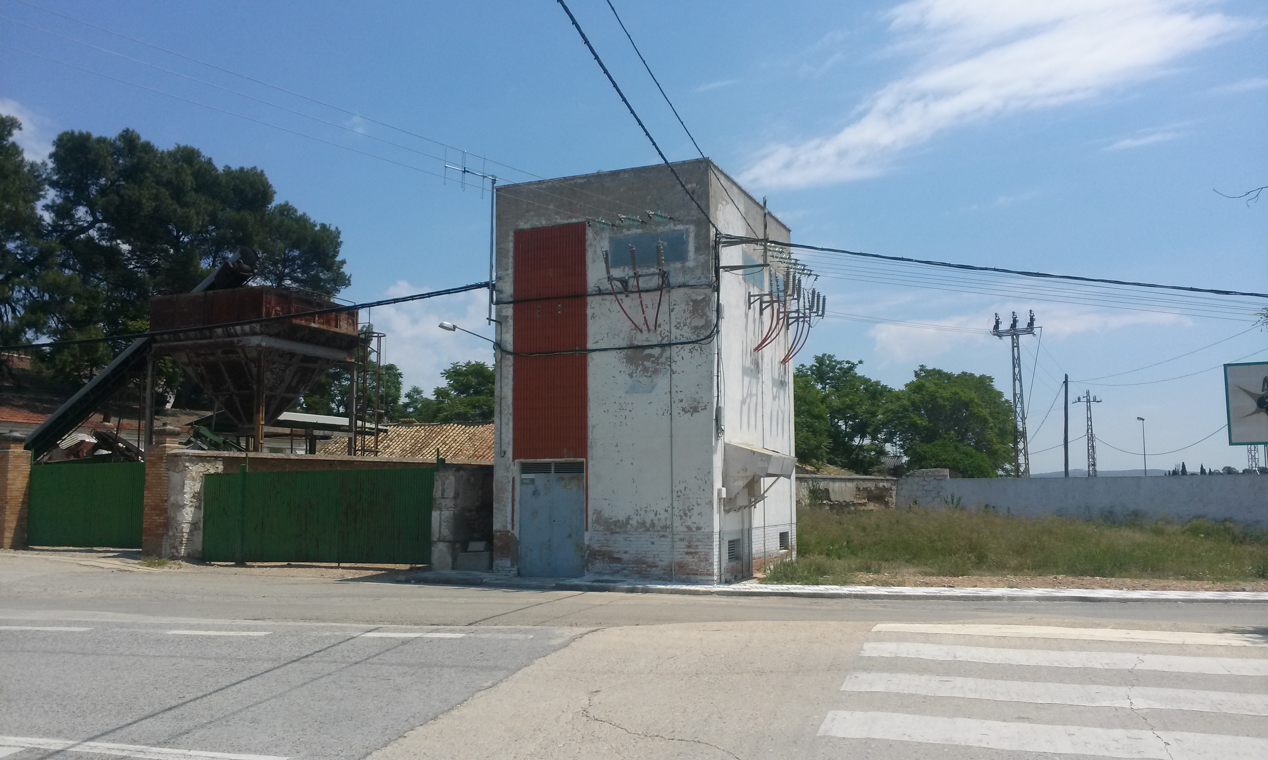 Almazara en Espelúy.